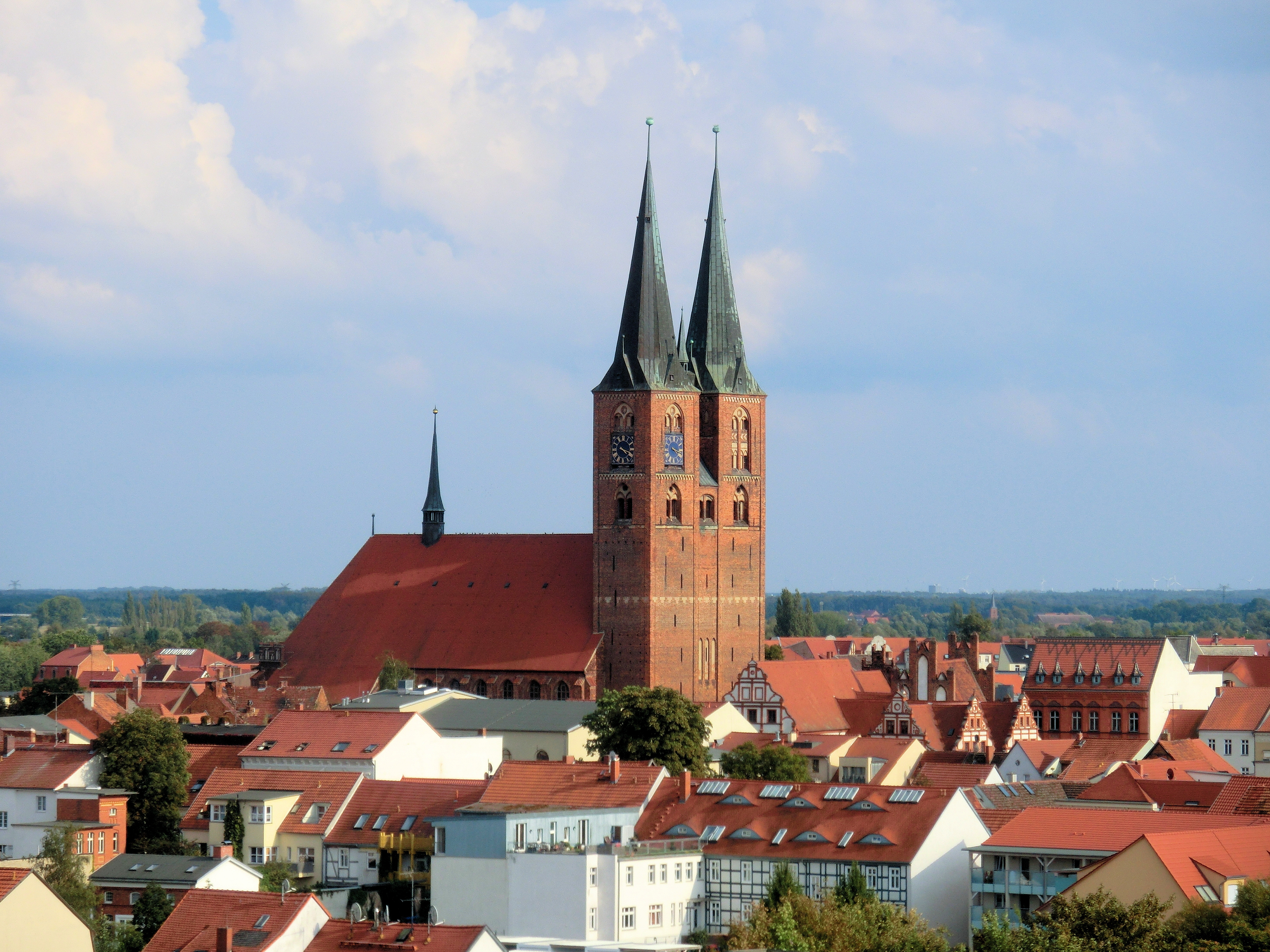 Stendal Marienkirche